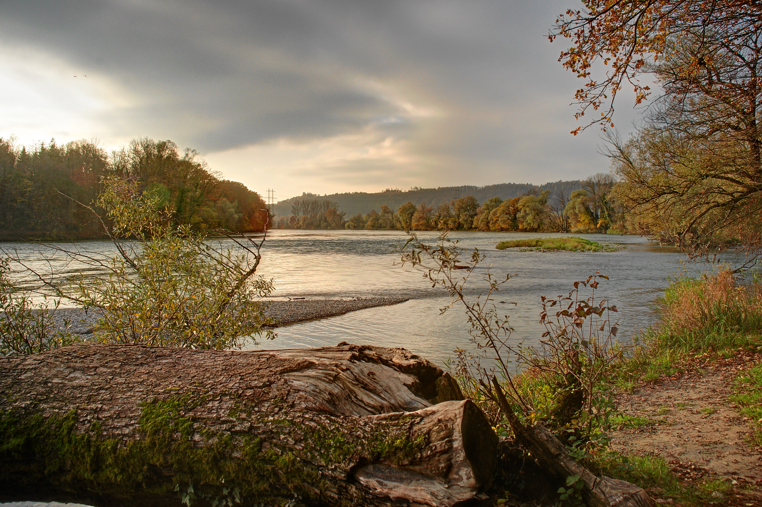 Hochrhein: nach dem Koblenzer Laufen flussabwärts